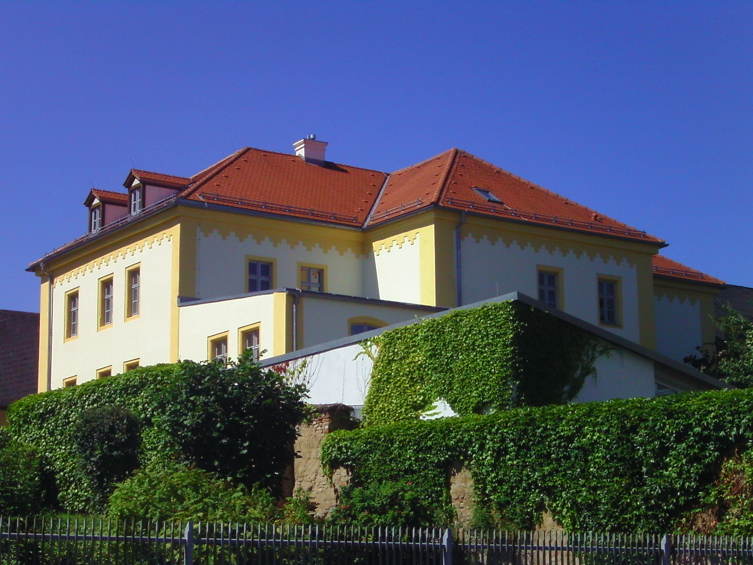 Stadtmuseum Tirschenreuth